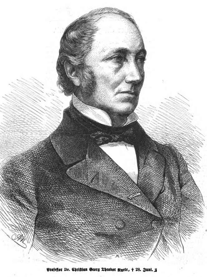 Christian Georg Theodor Ruete, deutscher Augenarzt im 19. Jh.